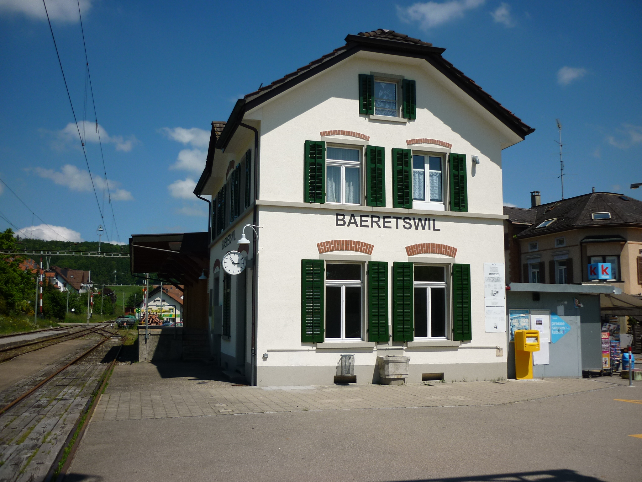 Bahnhof Bäretswil ZH, Schweiz